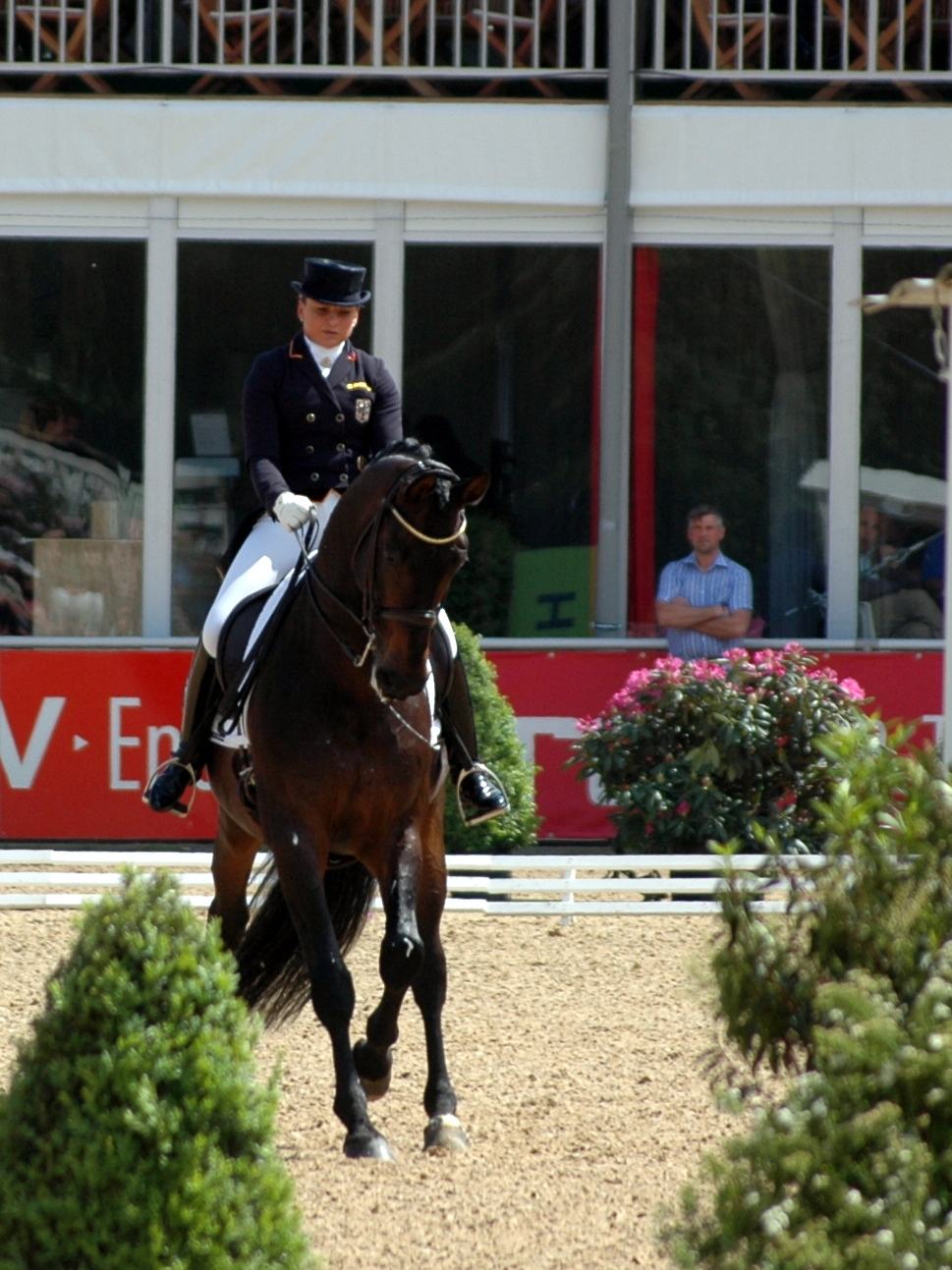 51. Maimarkt-Turnier: Dorothee Schneider mit Silvano